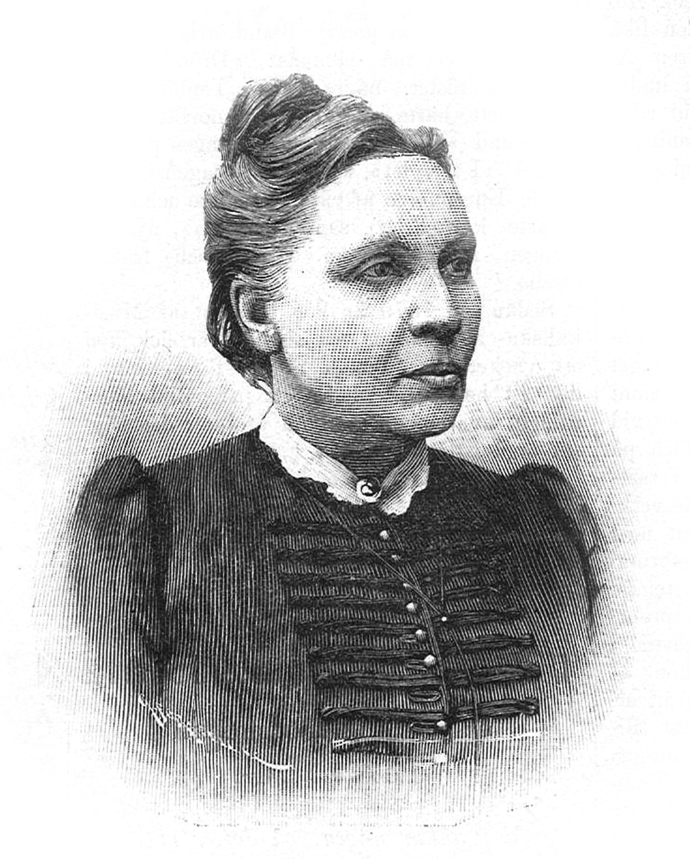 Elfrida Andrée (1841–1929).